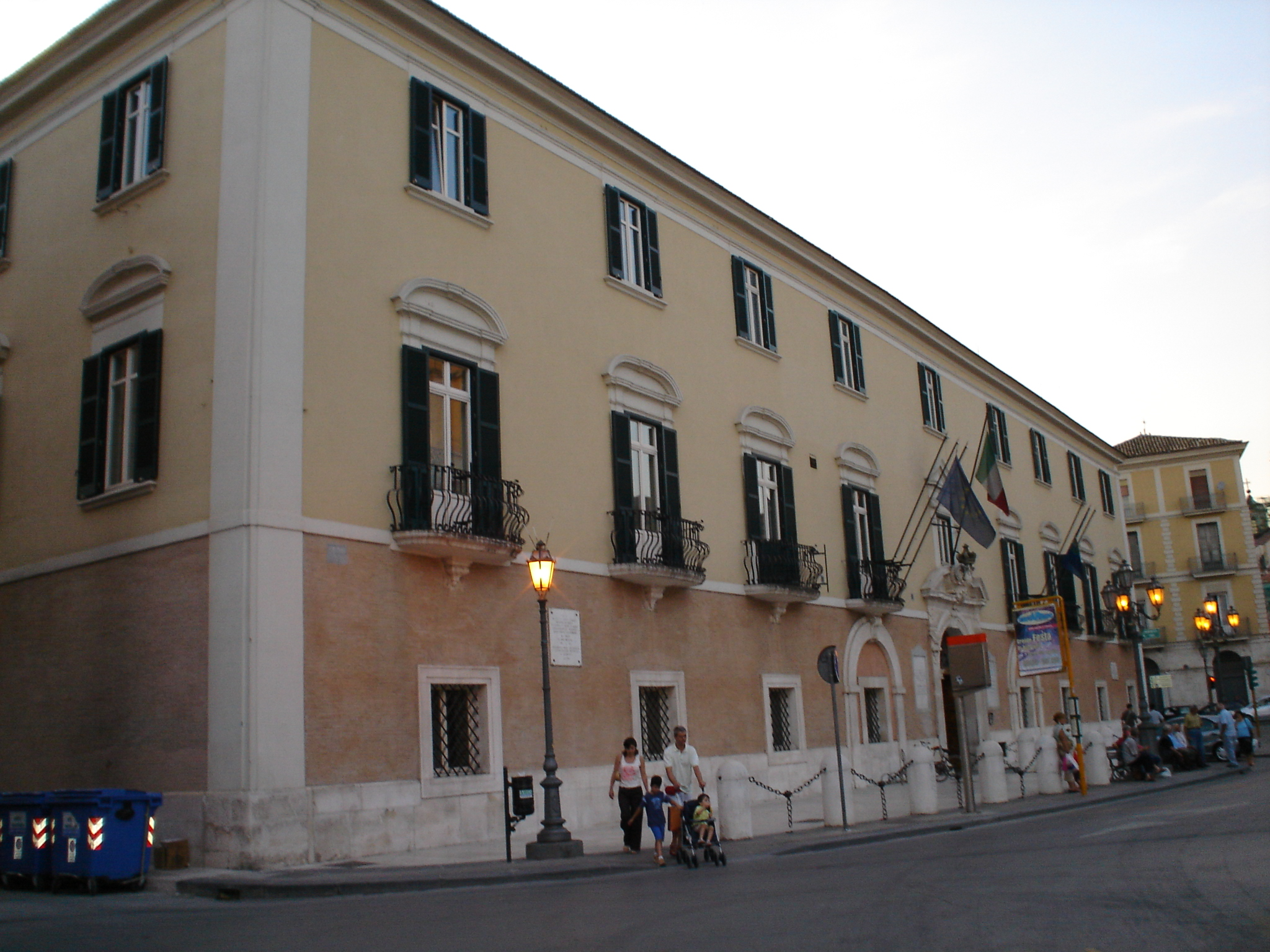 Il nuovo palazzo della Dogana, costruito dopo il terremoto del 1731, Foggia – Italia.